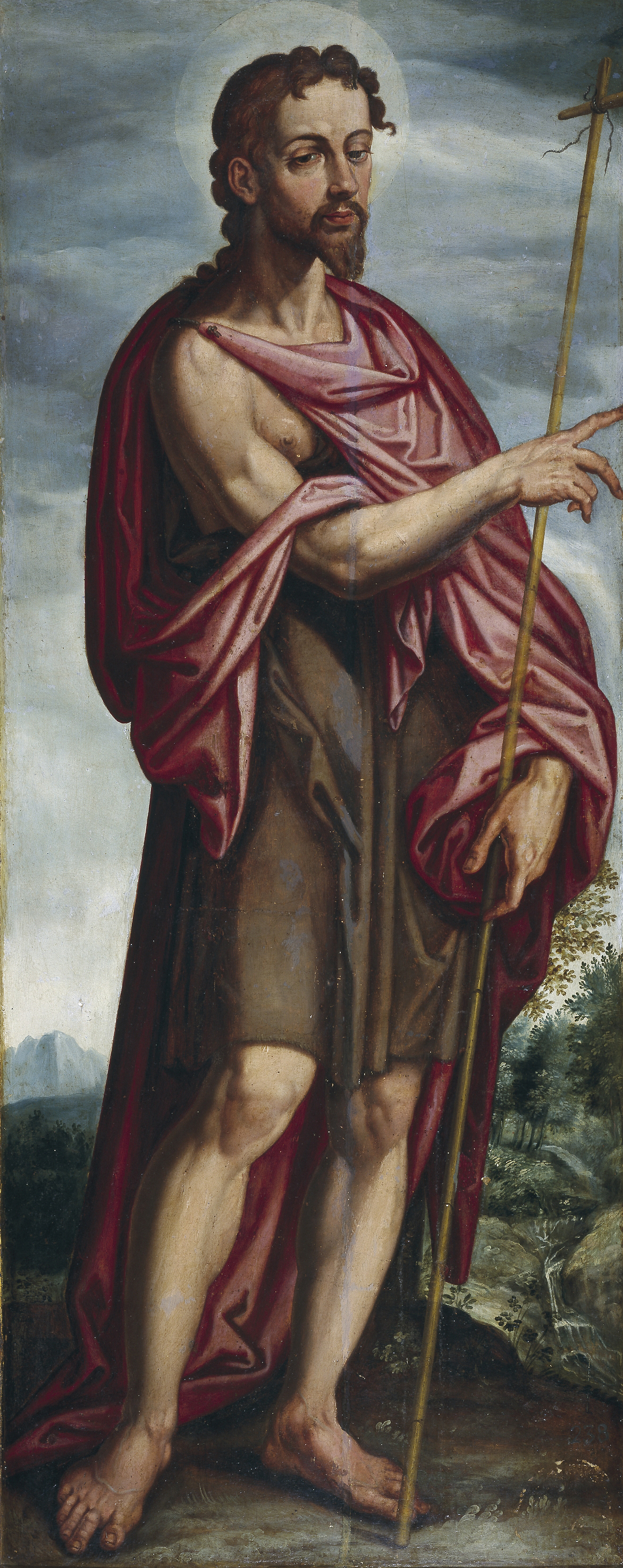 La obra representa al profeta San Juan Bautista, que fue decapitado por orden del rey Herodes Antipas, y es una de las cuatro obras de Francisco Pacheco que se conservan en el Museo del Prado.